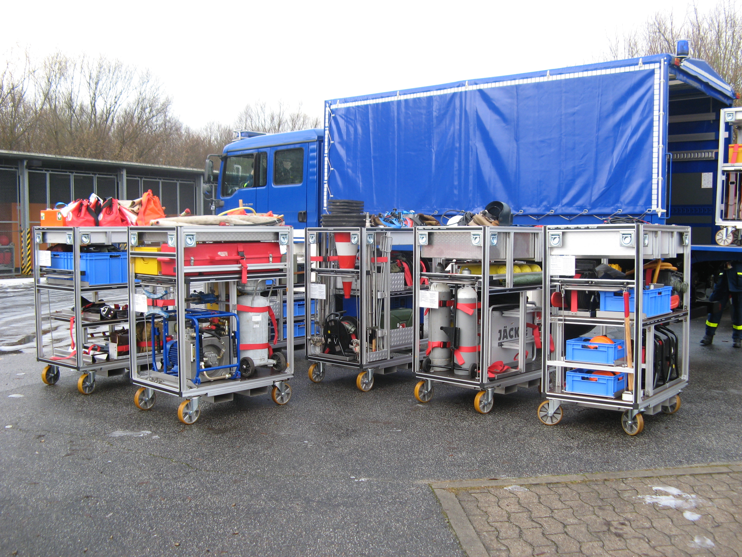 Die Rollcontainer passend zum MzKW im Hintergrund